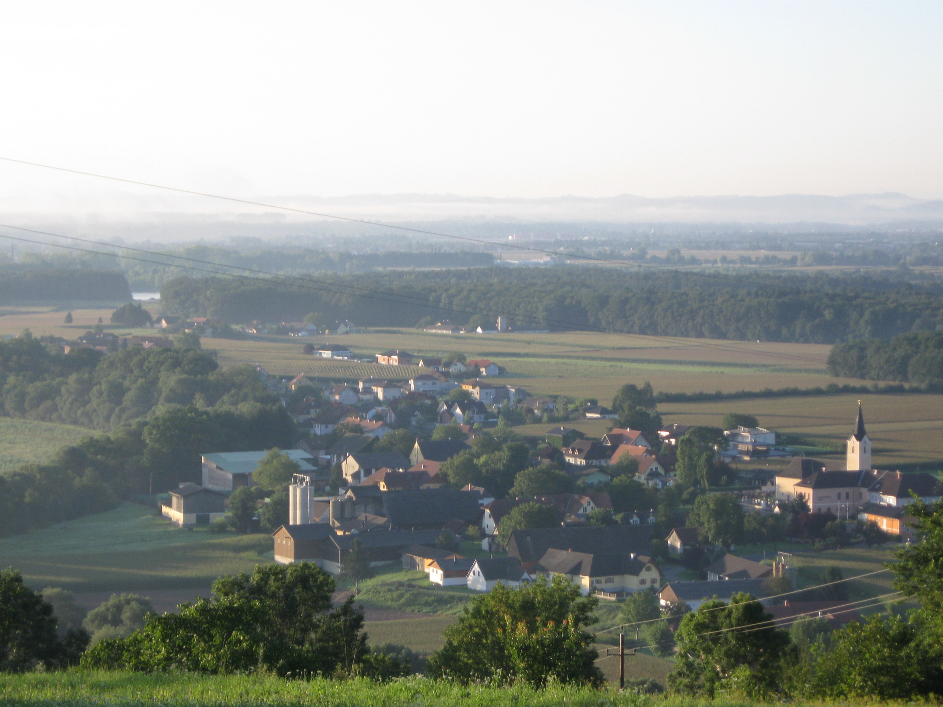 Posnetek kraja Lang na avstrijskem štajerskem.